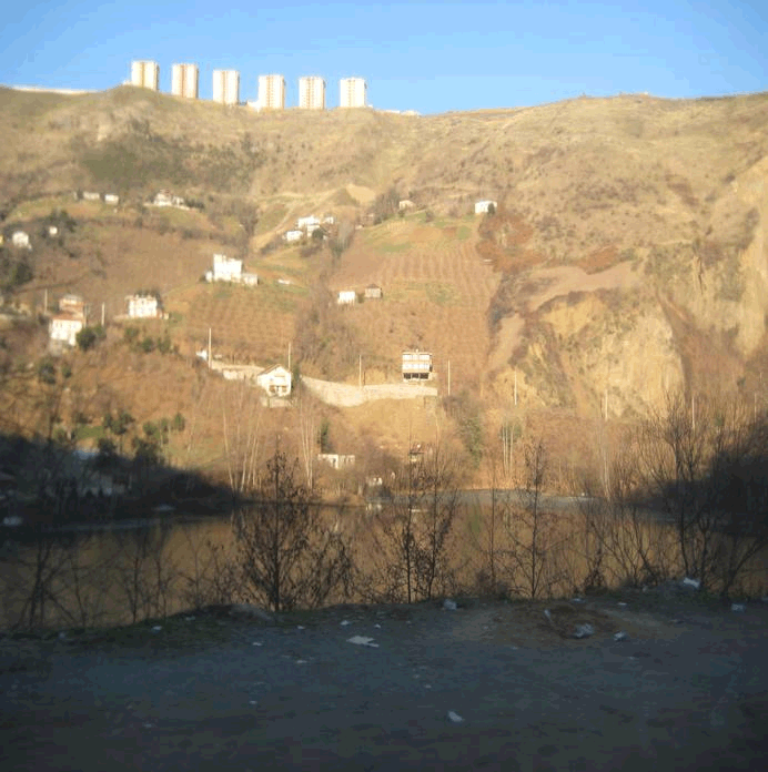 Sera Lake